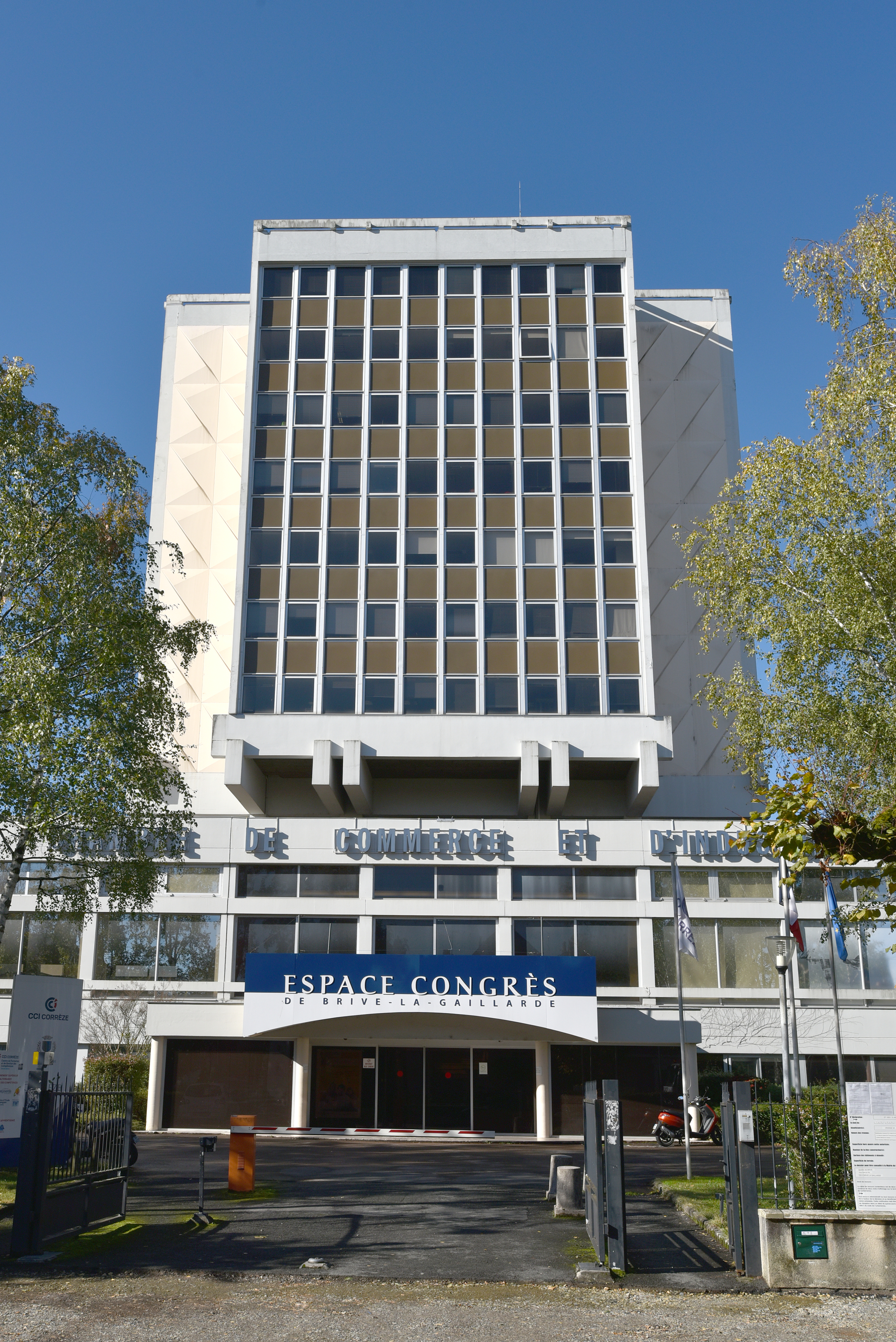 Siège de la SEM 19 Territoires à Brive